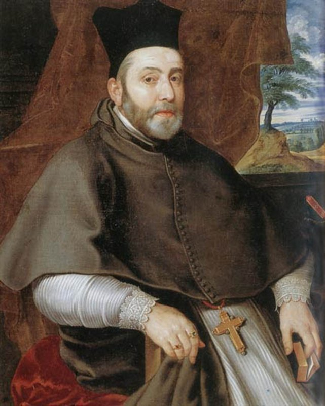 Pater Oliviers O.F.M. Portret van Joseph de Bergaigne O.F.M., 1641-1645 (olieverf op doek, 100.7 x 81.7 cm) Noordbrabants Museum (inv.nr. 12969)